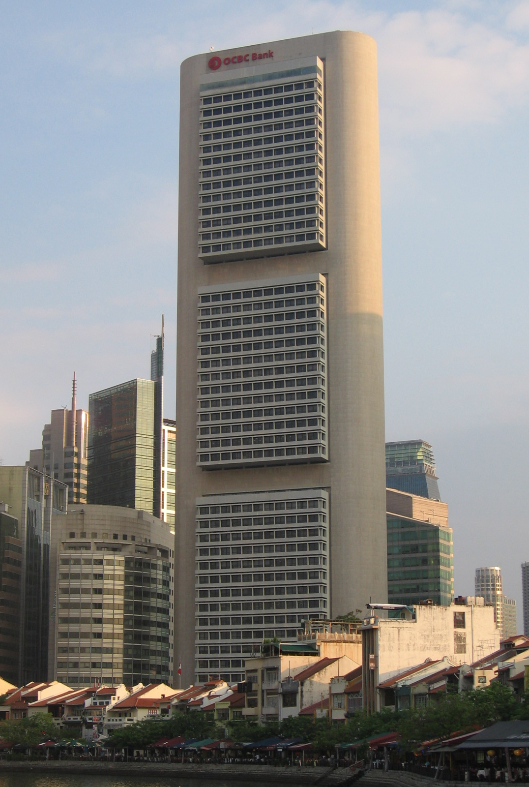 OCBC Centre